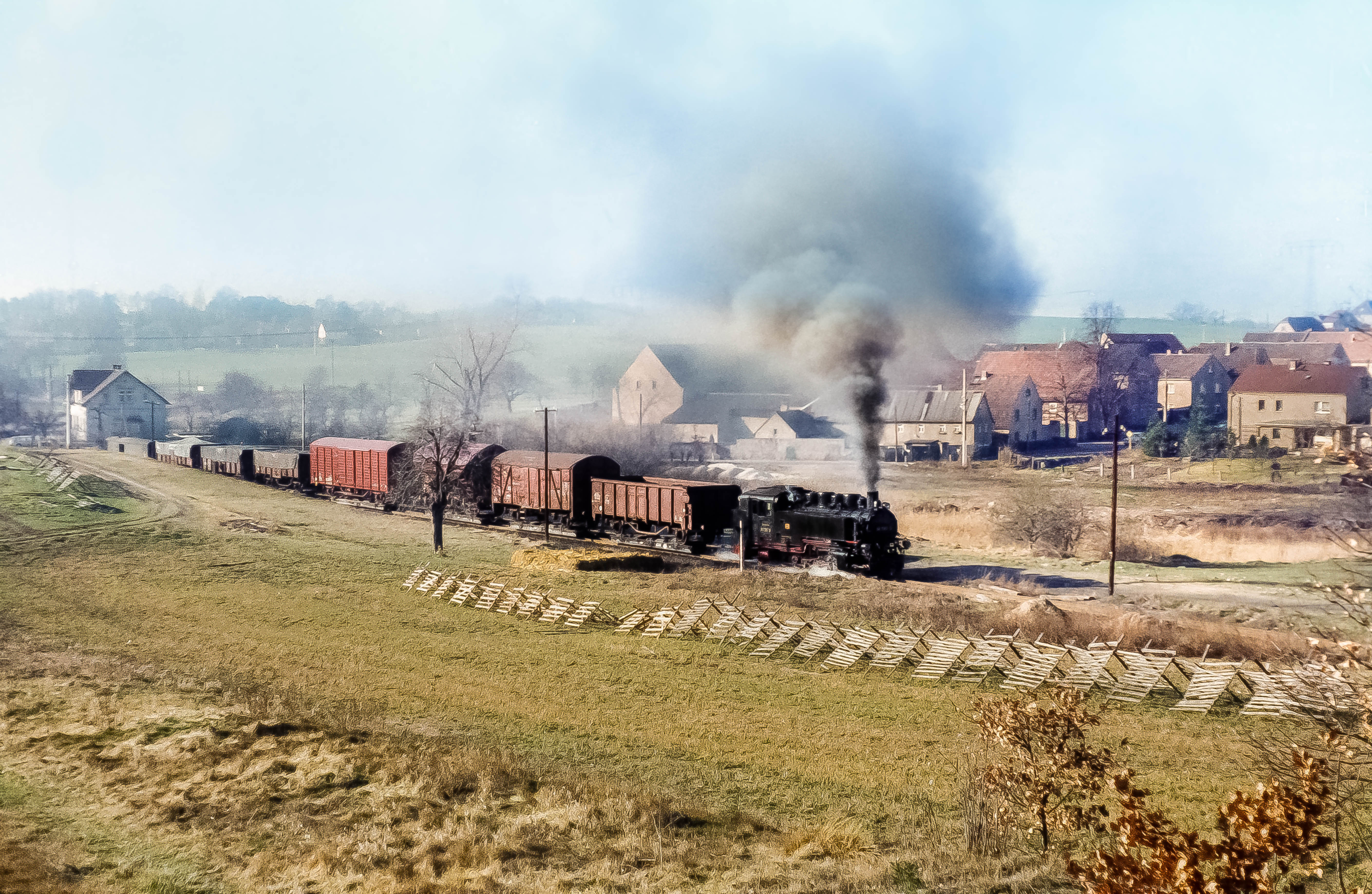 Güterzug bei Dippelsdorf